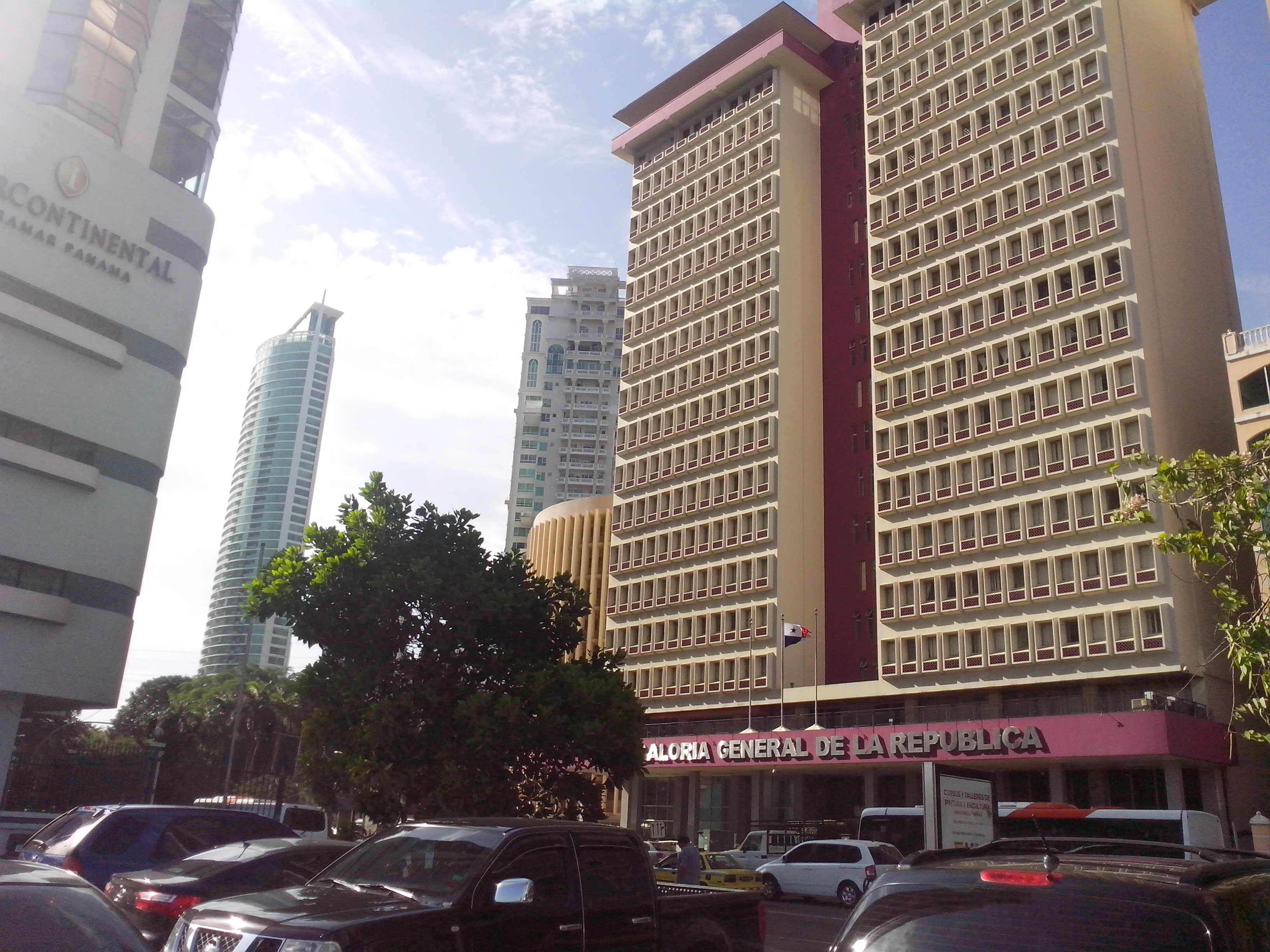 Bella Vista, Panamá, Panama